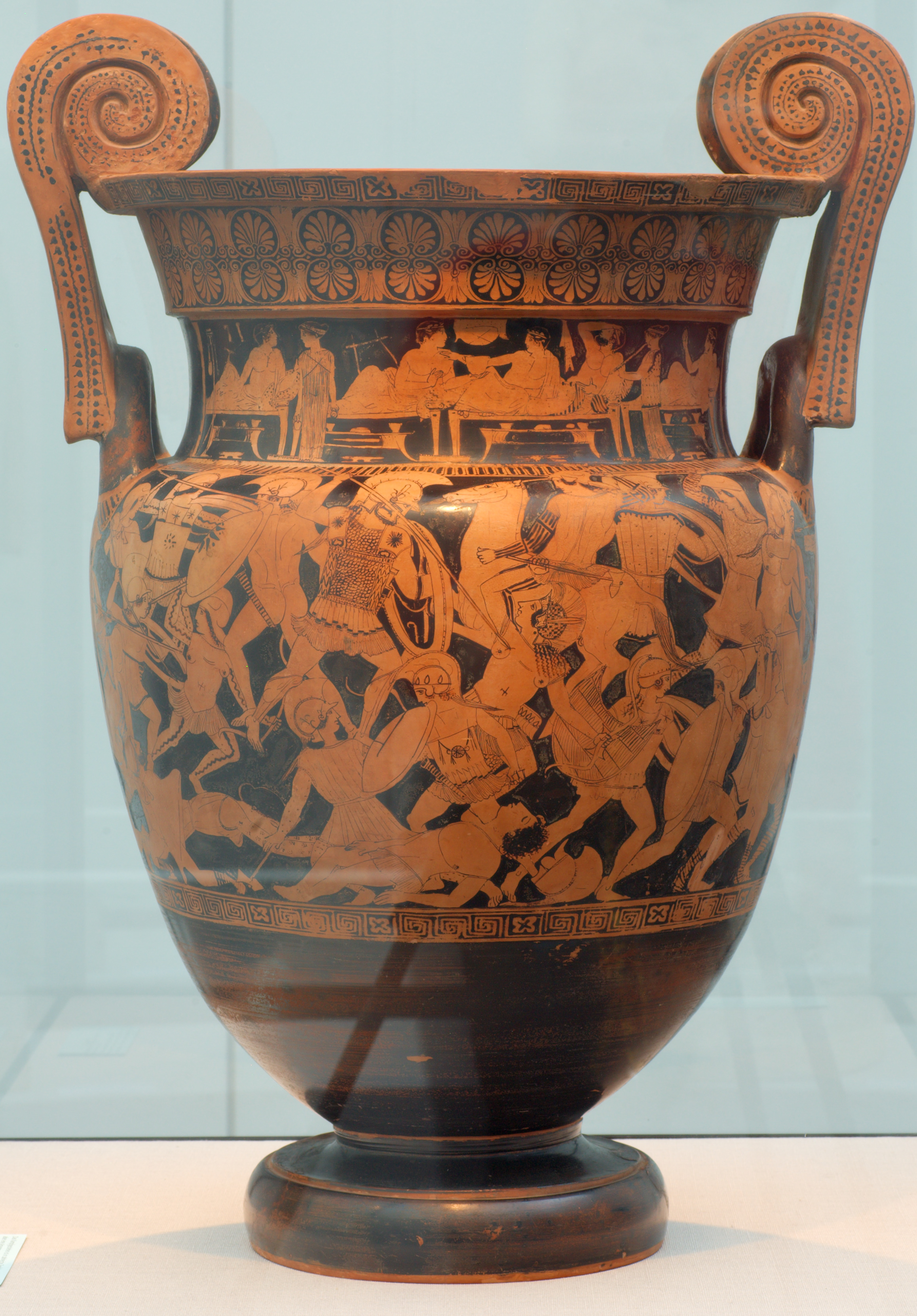 Description